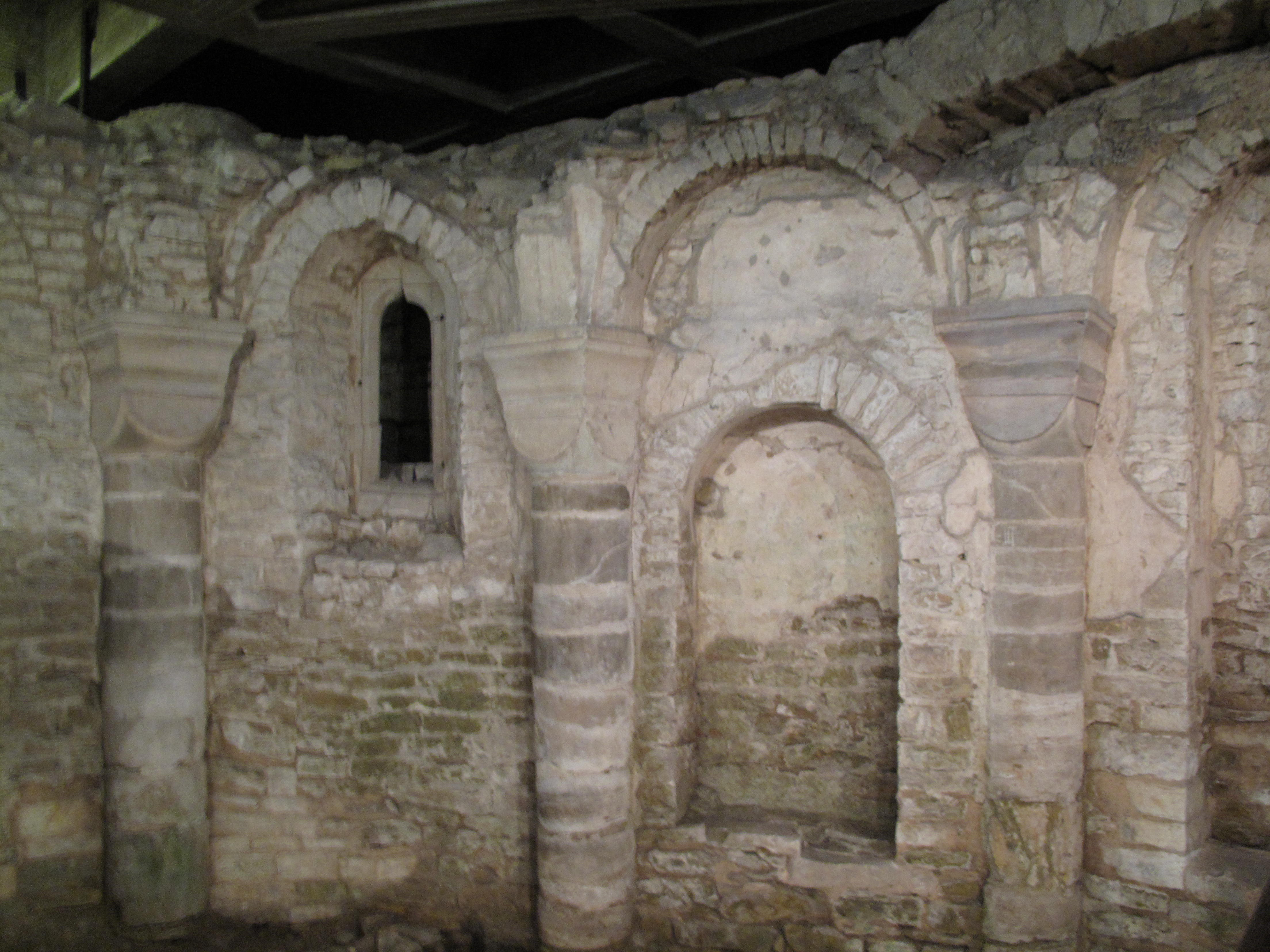 Břevnovský klášter, podzemí